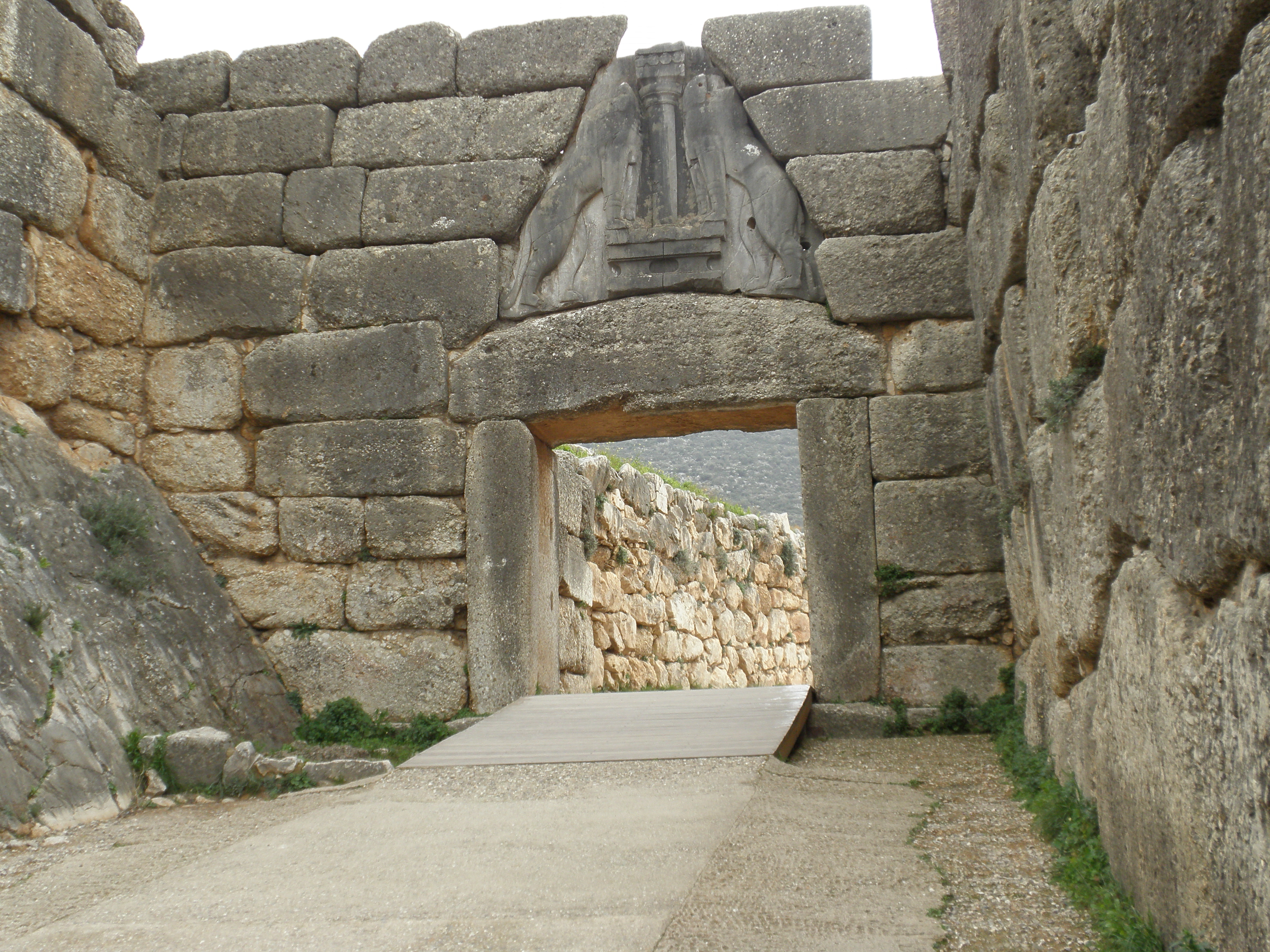 Πύλη Λεόντων«Πύλη Λεόντων»